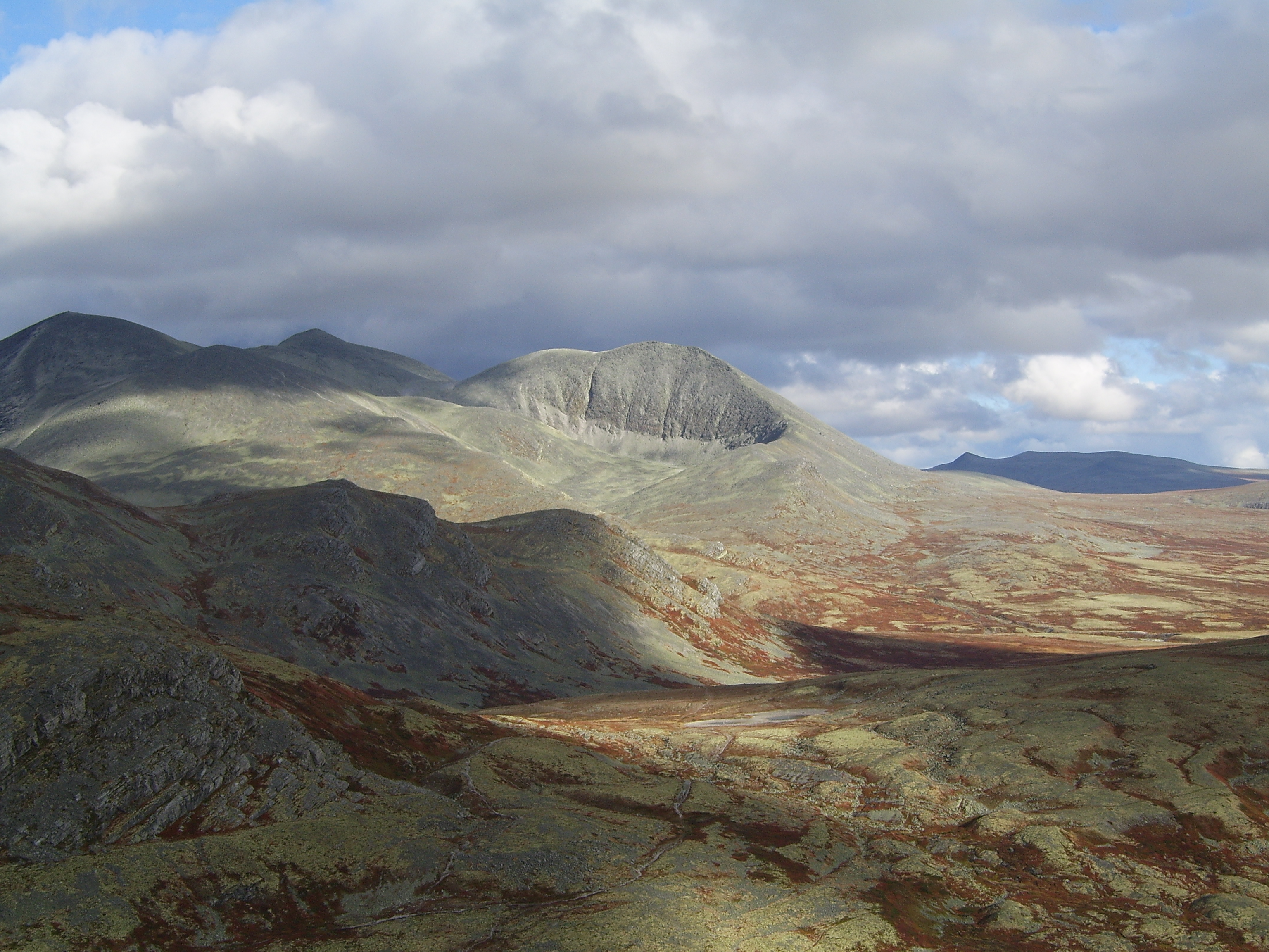 Rondane